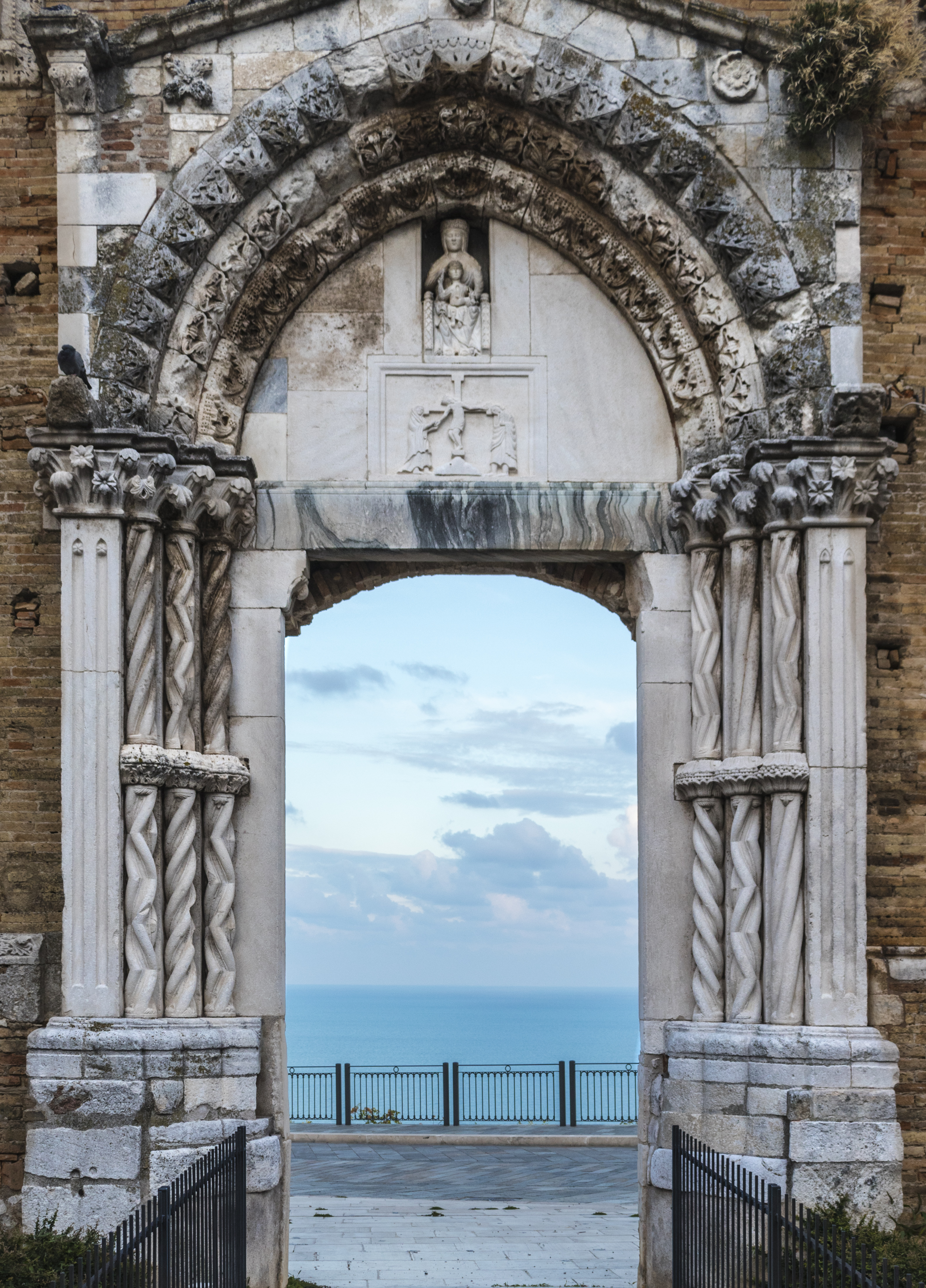 Portale della Chiesa di San Pietro di Vasto, crollata in seguito alla frana del 1956 e situata presso la Passeggiata Archeologica. This is a photo of a monument which is part of cultural heritage of Italy.